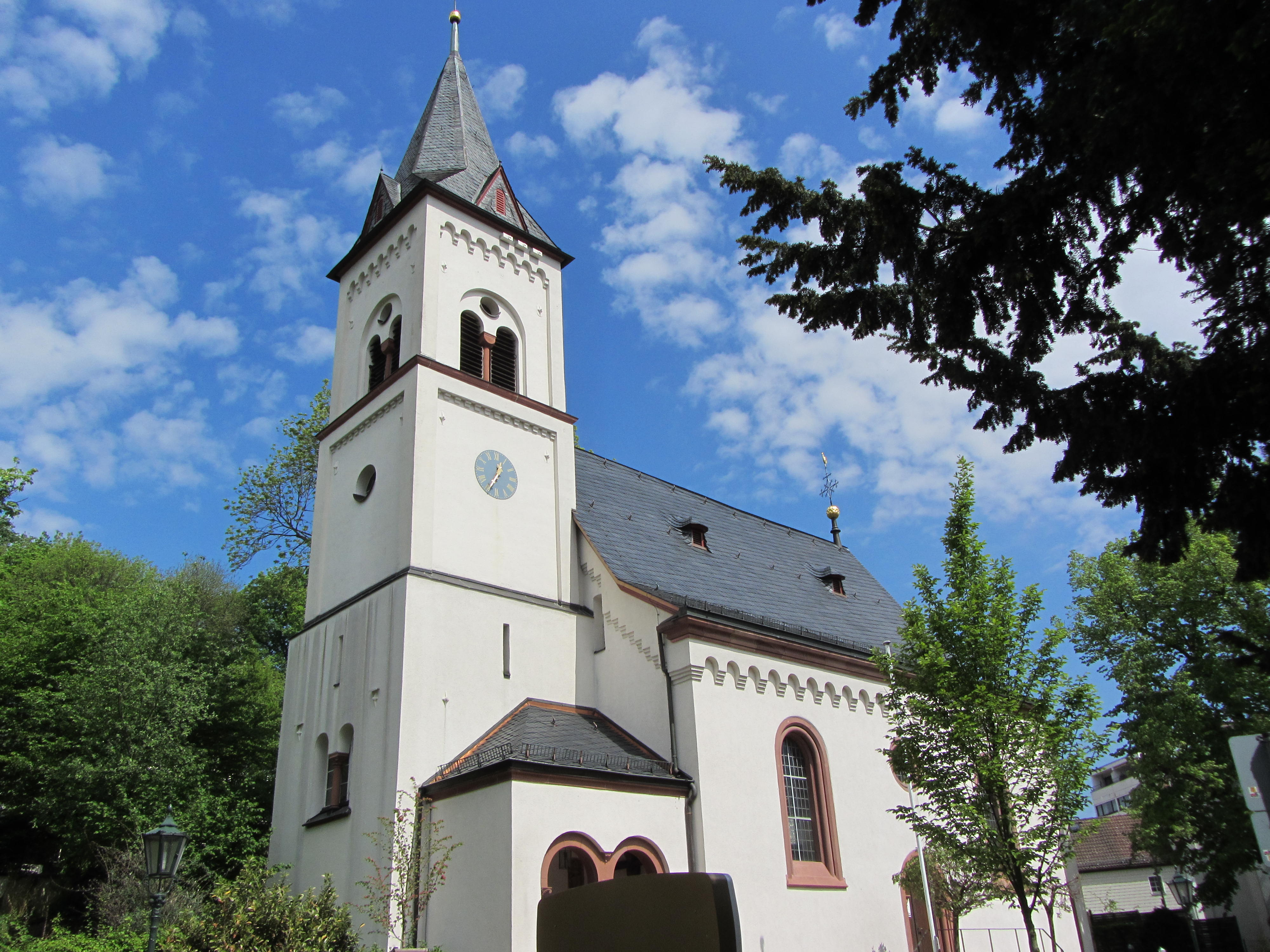 Ev. Kirche in Bad Soden am Taunus